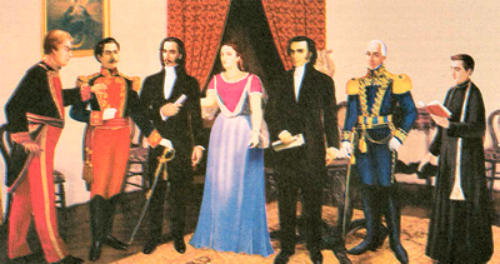 Representación de la reunión de los próceres del 10 de agosto de 1809, reunidos en la casa de doña Manuela Cañizarez antes de dar el golpe de Estado. Óleo sobre lienzo, autor anónimo (inicios del siglo XX).